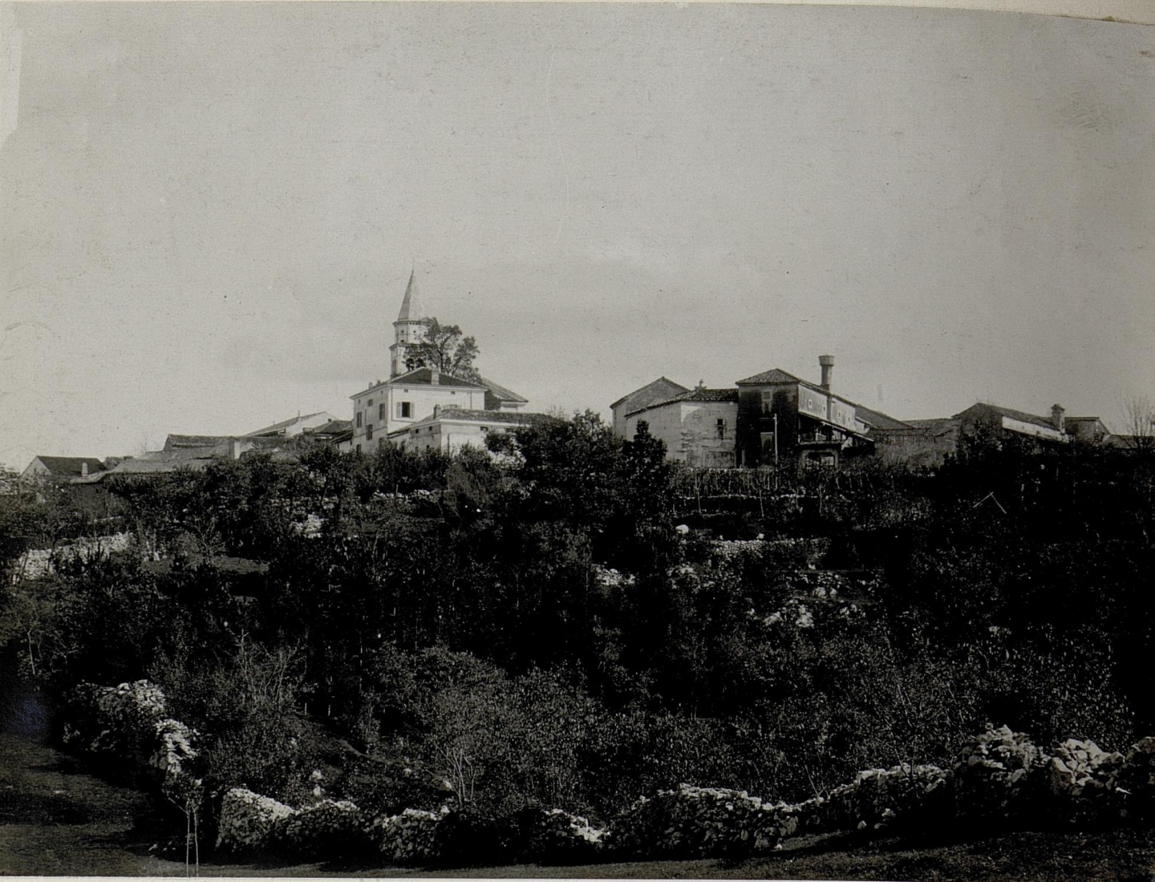 Pliskovica